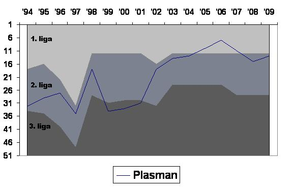 Ligaški plasman NK Istre 1961